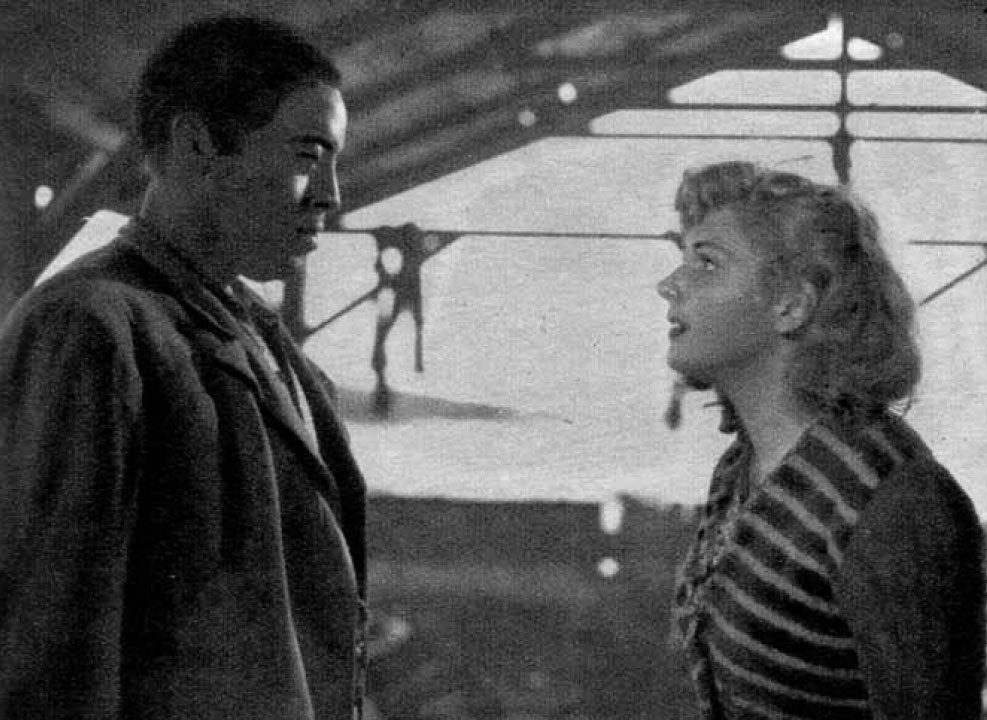 John Kitzmiller (Jerry) e Carla Del Poggio (Angela) in una scena di "Senza pietà", regia di Alberto Lattuada (1948).